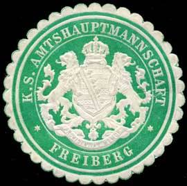 Sealing stamp Title: Königlich Sächsische Amtshauptmannschaft - Freiberg Description: grün, weiß, geprägt Place: Freiberg / Sachsen size: 4 cm